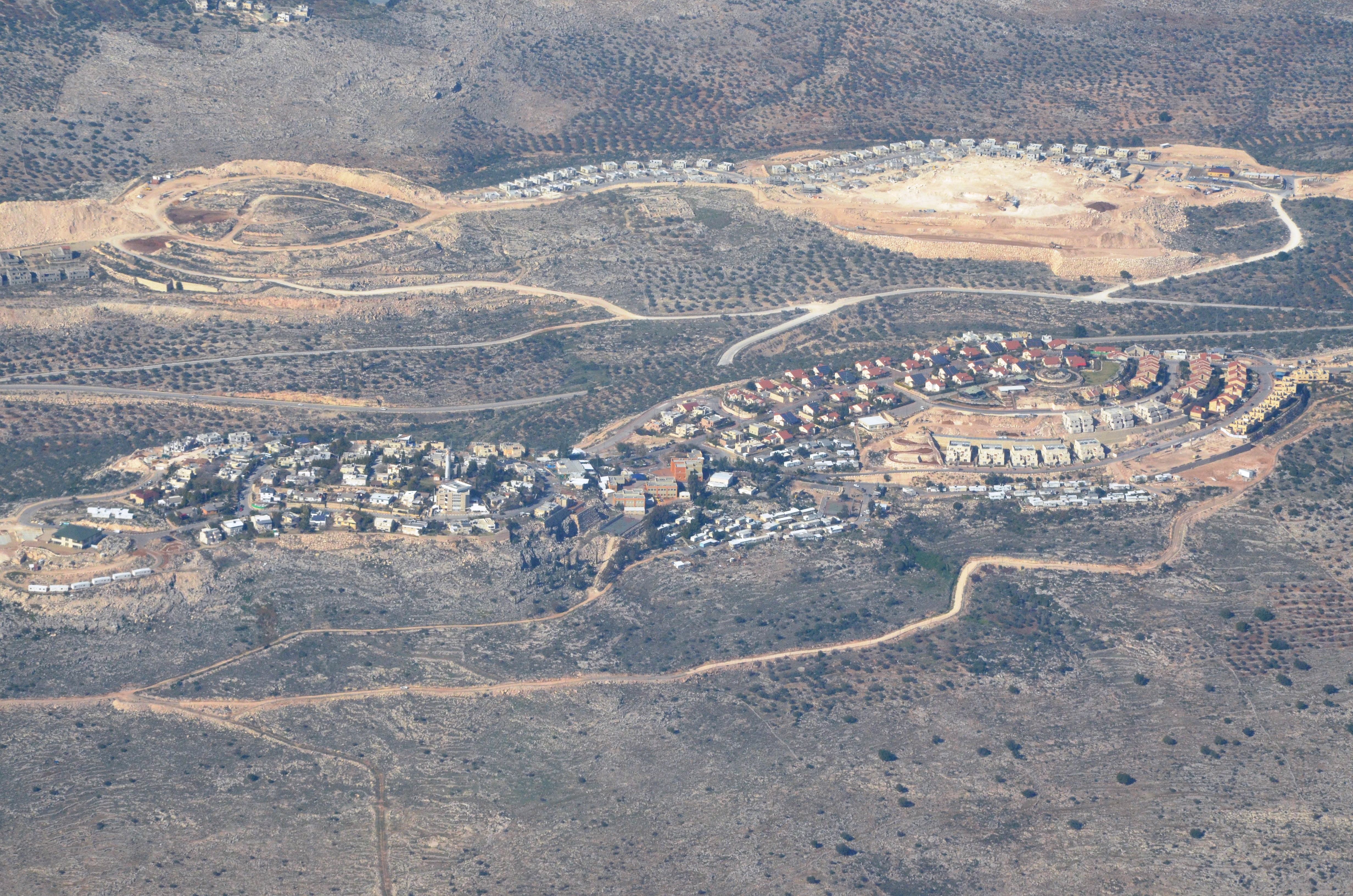 פדואל ולשם